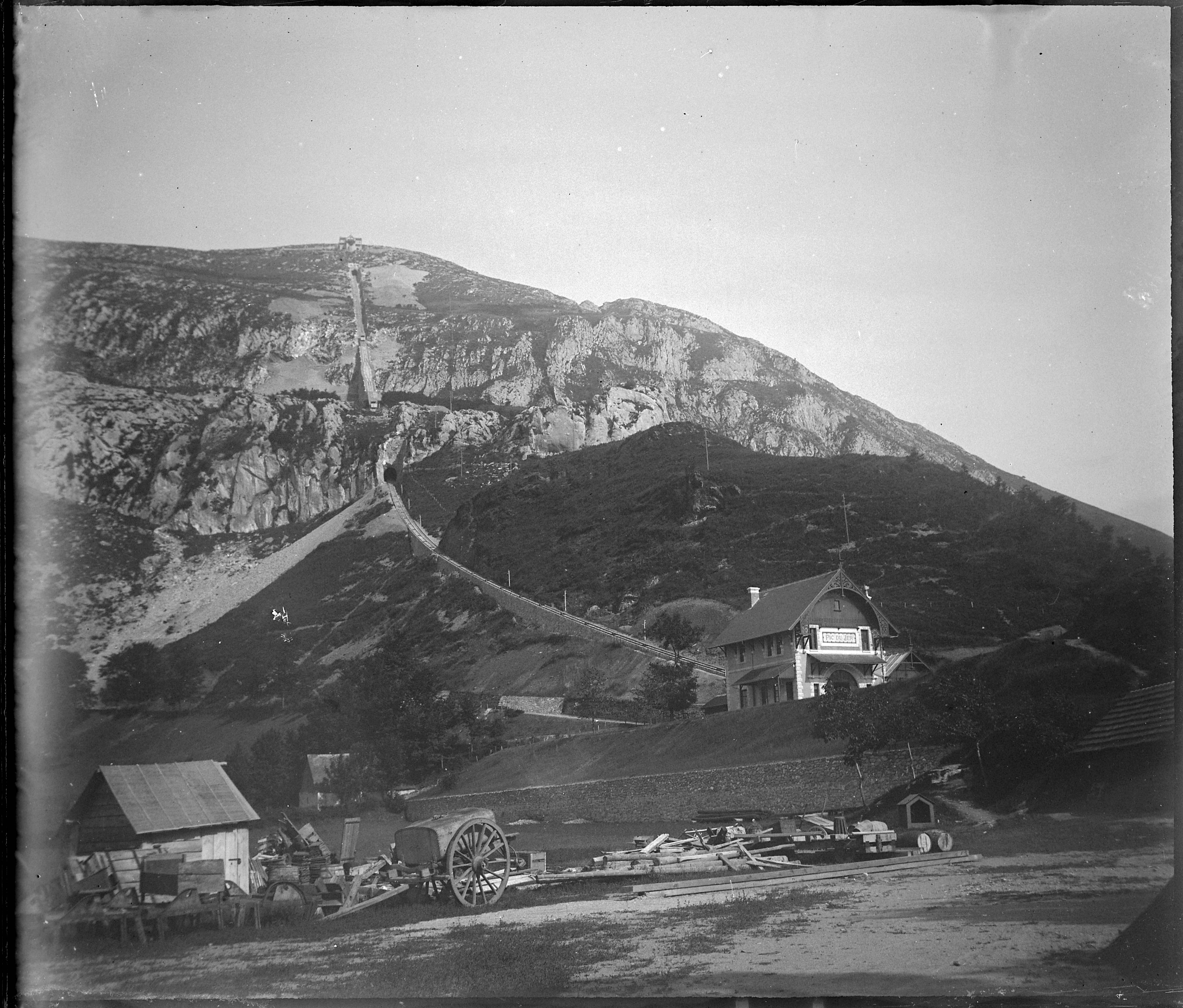 plaque négative au gélatino-bromure d'argent, format 8x9 cm. Inscription manuscrite par Eugène Trutat sur l'enveloppe : "Lourdes : funiculaire gare, ligne, Pic de Ger 14 Juillet 1900 Bellieni bleue"